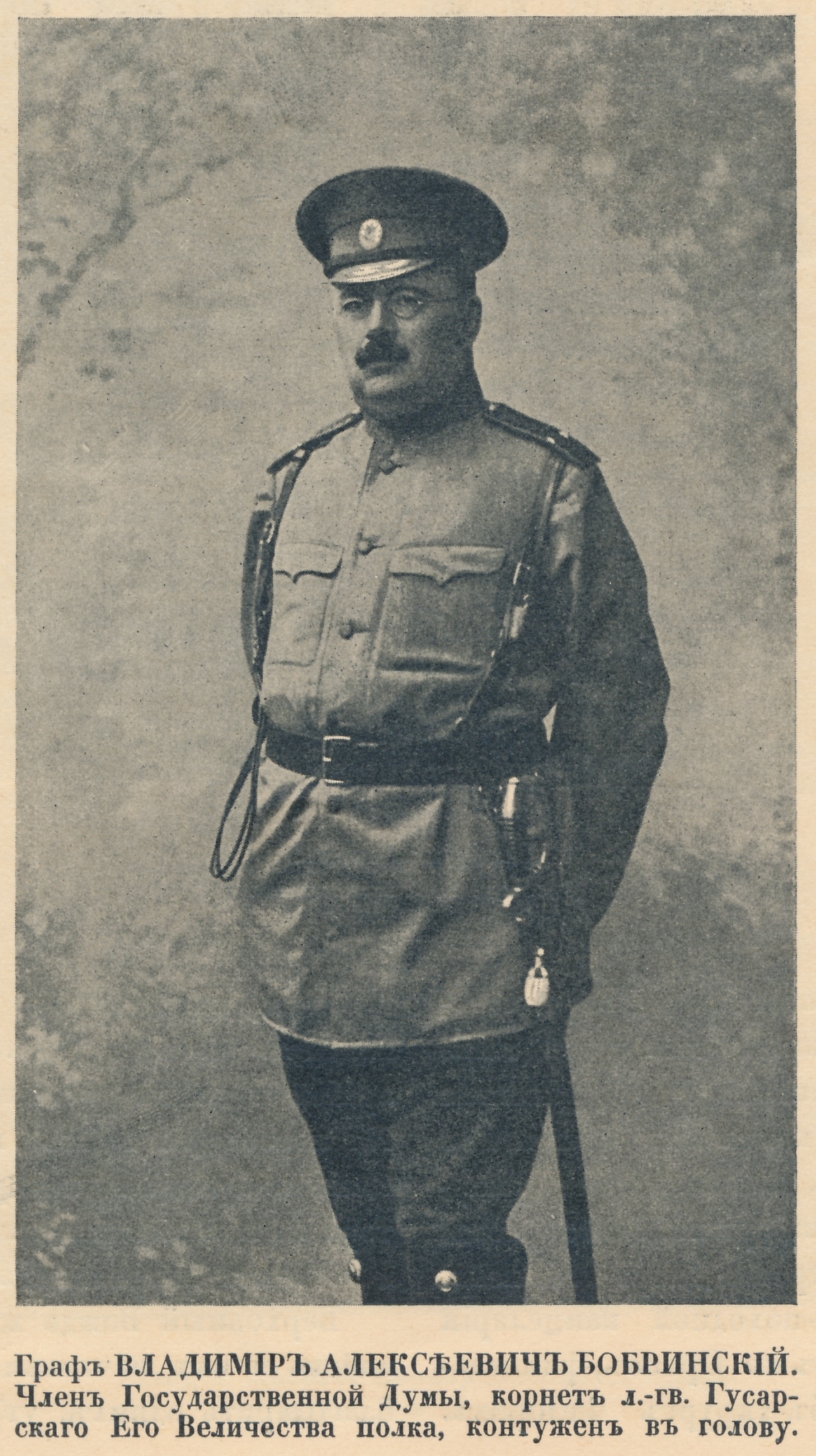 Граф Владимир Алексеевич Бобринский в 1914 году.